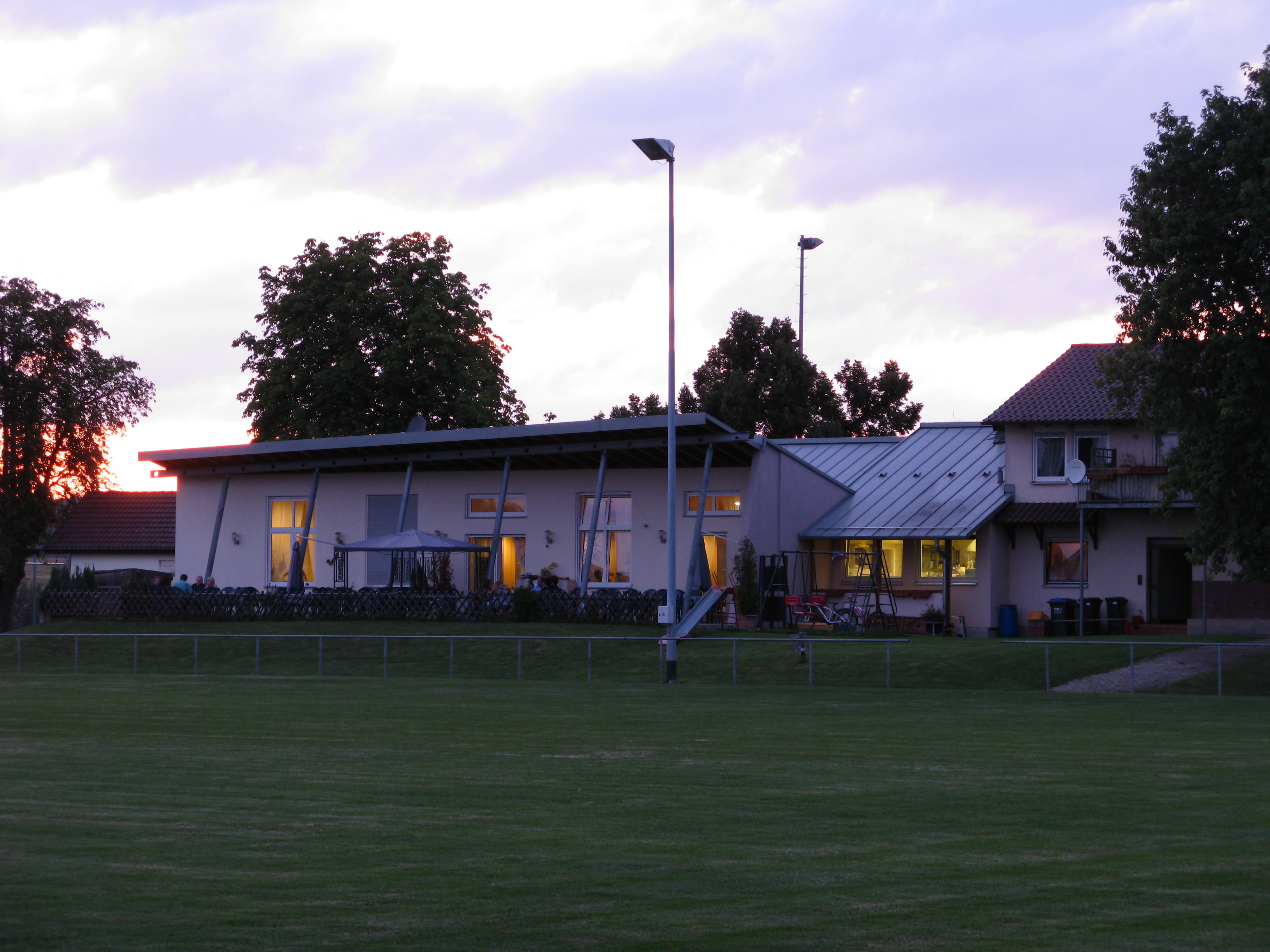 Das Sportheim am Sportplatz in Pliezhausen-Gniebel, Furtweg, Germany, Landkreis Reutlingen